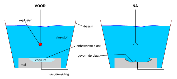 Schema over het explosievormen met principe en opstelling.